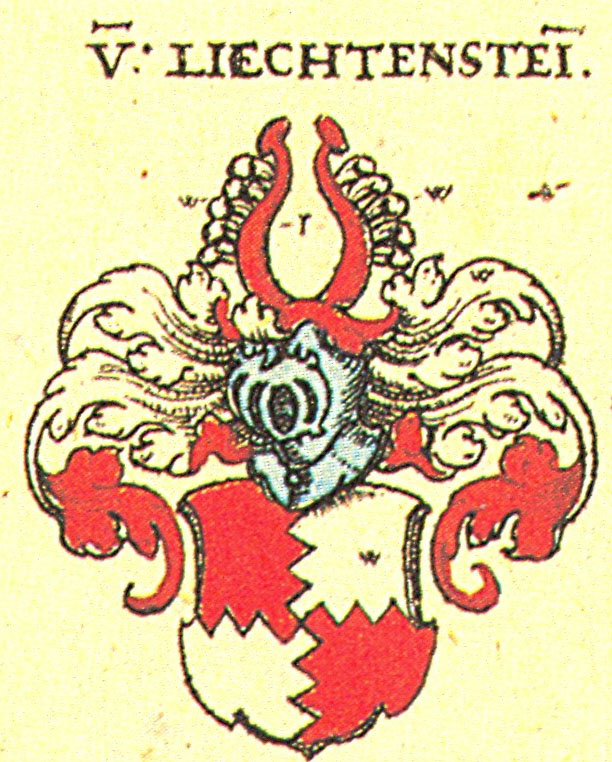 Wappen der Fränkischen Adelsfamilie Liechtenstein